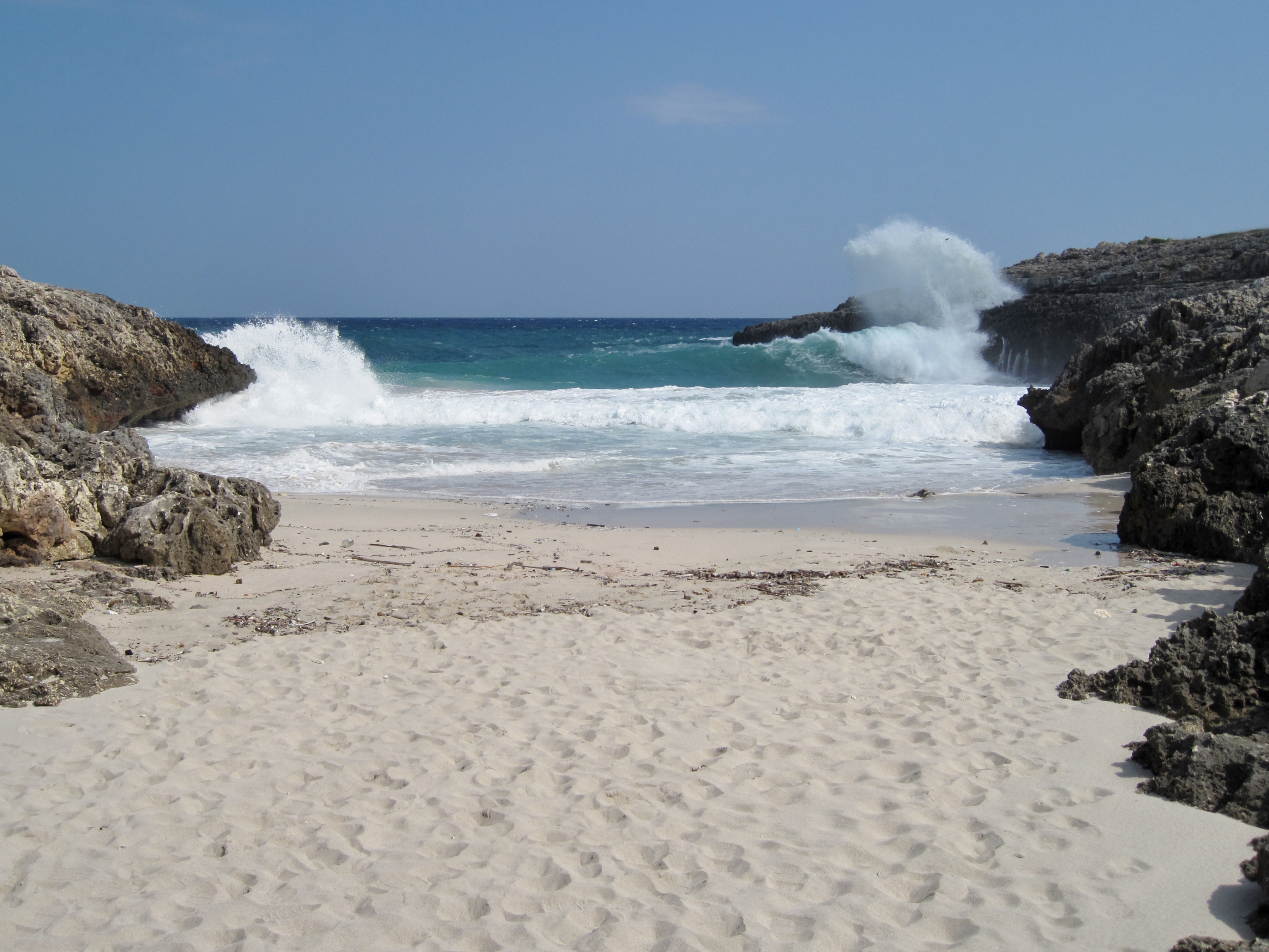 Caló des Serral, kleine Bucht an der Küste der Gemeinde Manacor, Mallorca, Spanien